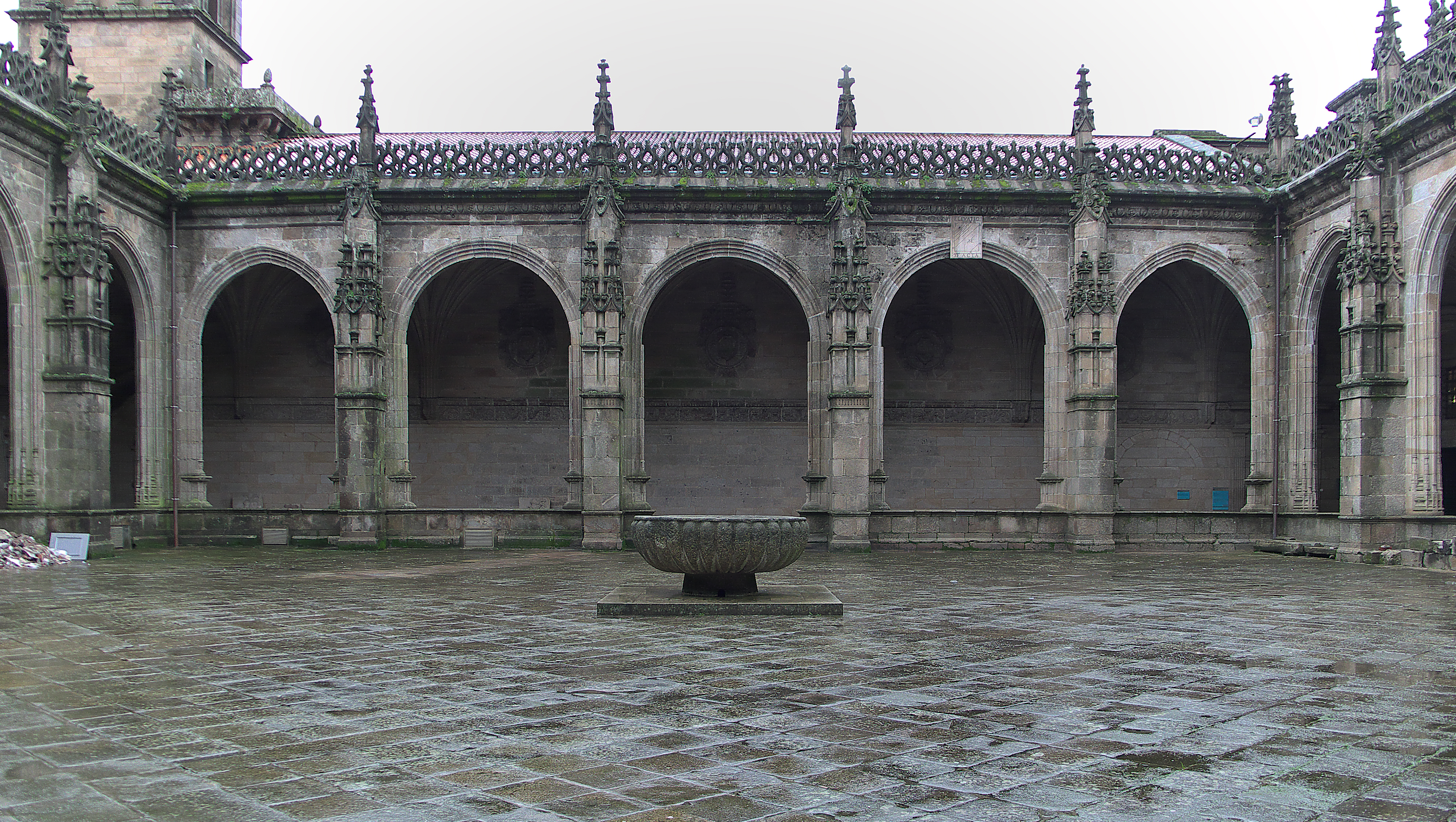 La obra plateresca de Juan de Álava (Juan de Ybarra), Jácome García, su aparejador, y Rodrigo Gil de Hontañón. Juan de Herrera de Gajano termina (1566) la parte oeste del claustro, según las trazas de Rodrigo Gil de Hontañón. En el centro, la Fons Mirábilis. Una de las primeras obras renacentistas en Santiago